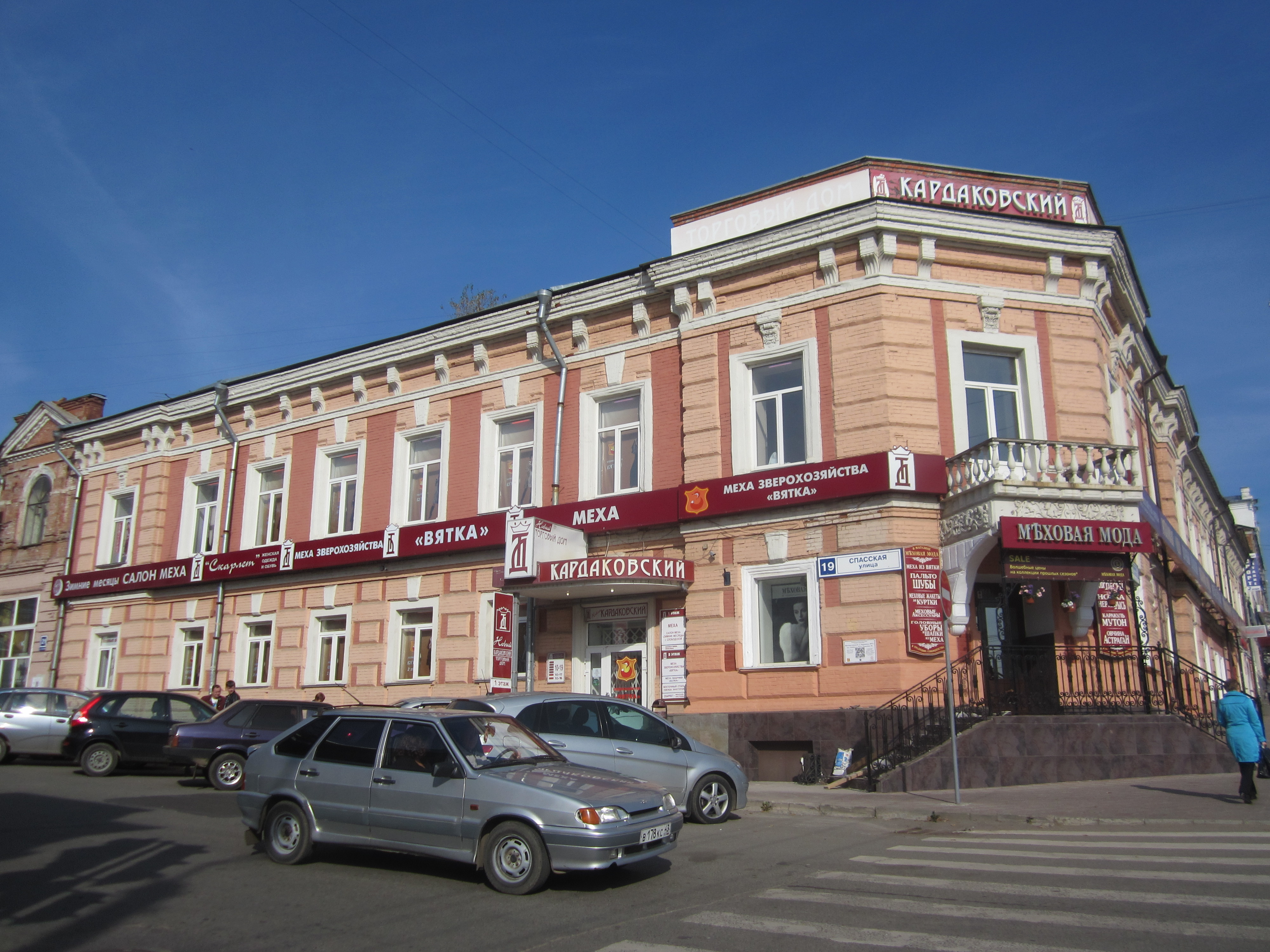 Здание Волжско-Камского банка: улица Спасская, 19, Киров, Кировская область